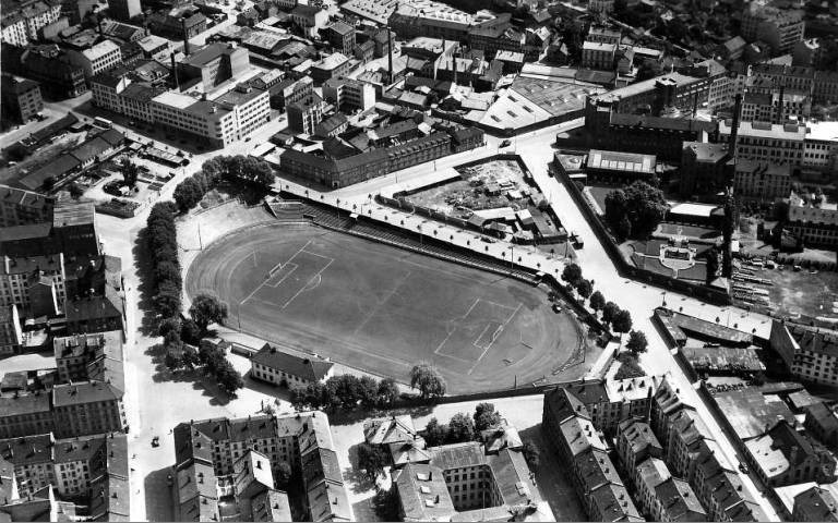 Dælenenga idrettsplass, Oslo, Norway